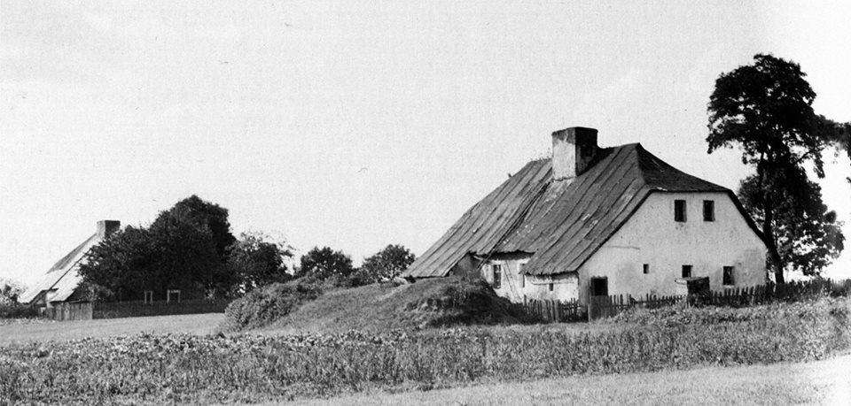 Kolonia Wolność Górnicza ok. 1925 roku